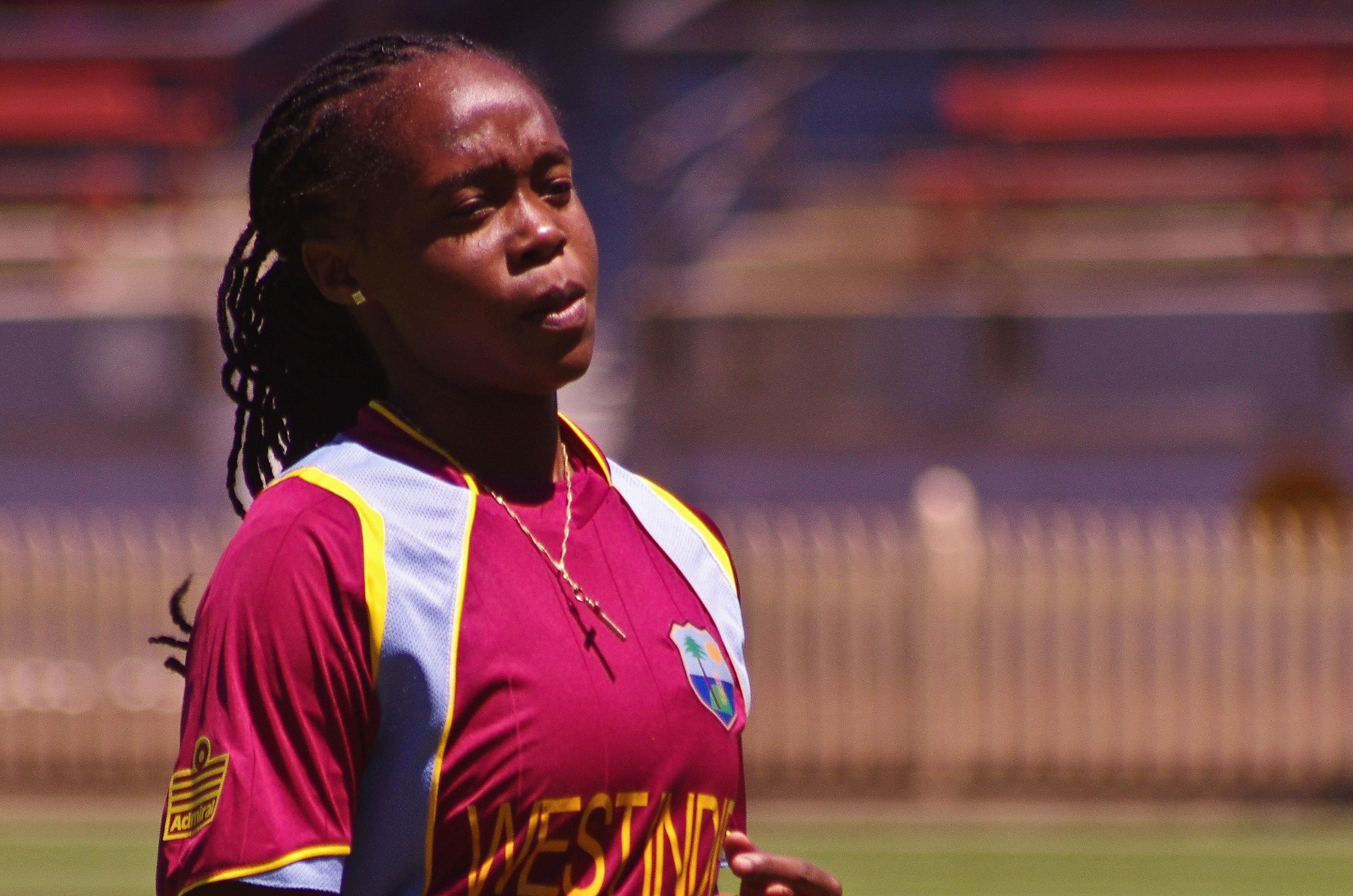 SHAQUANA QUINTYNE